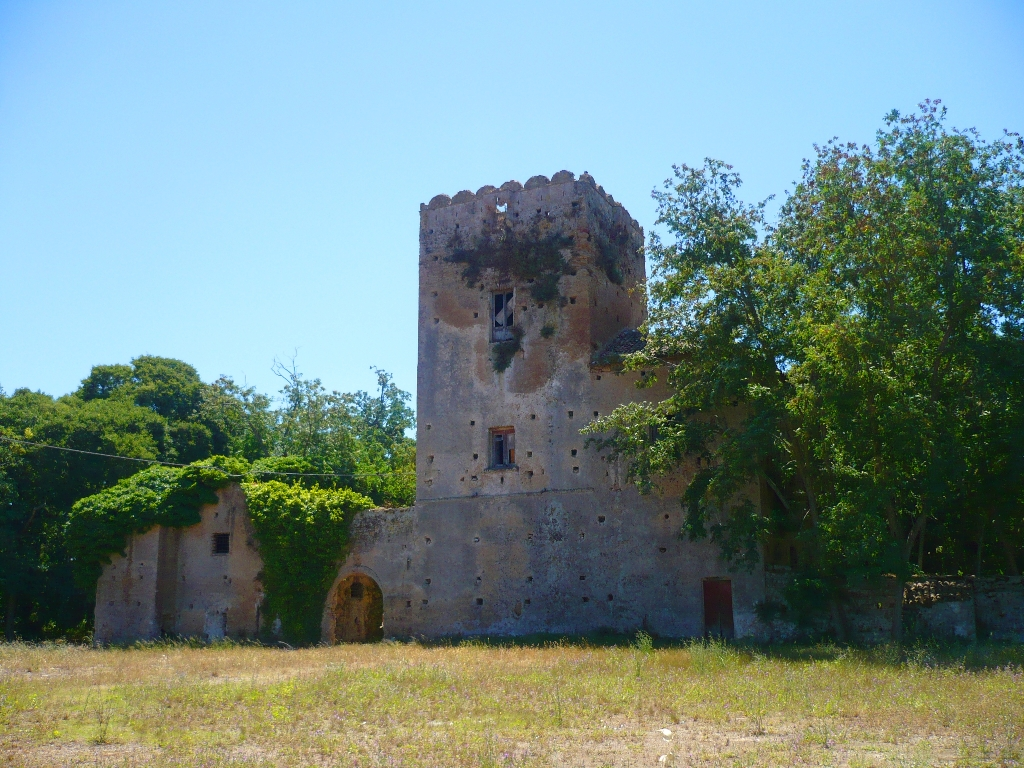 Torretta di S.Marco di Castellabate (Provincia di Salerno)